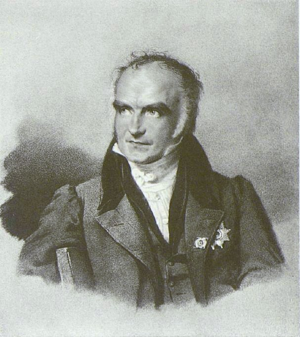 Граф Давид Максимович Алопеус (1769—1831)